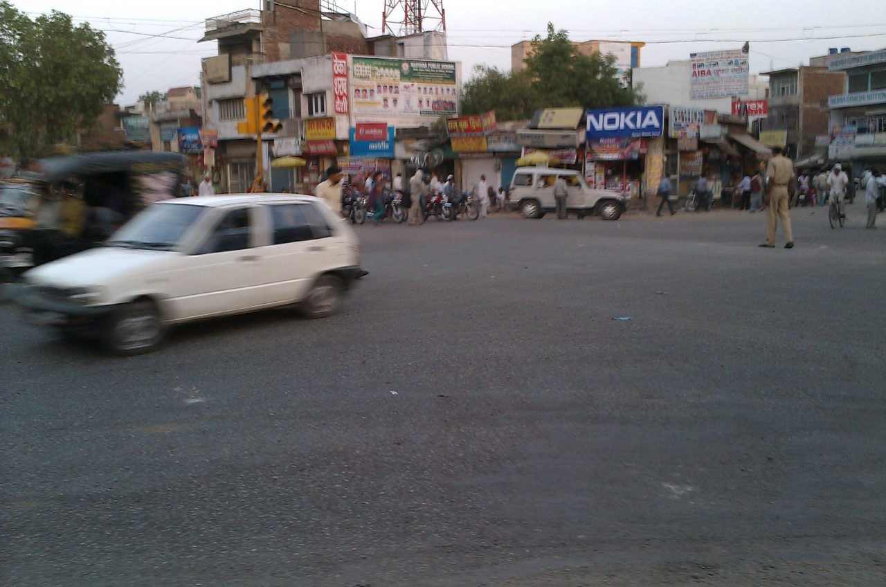 mahaveer chowk